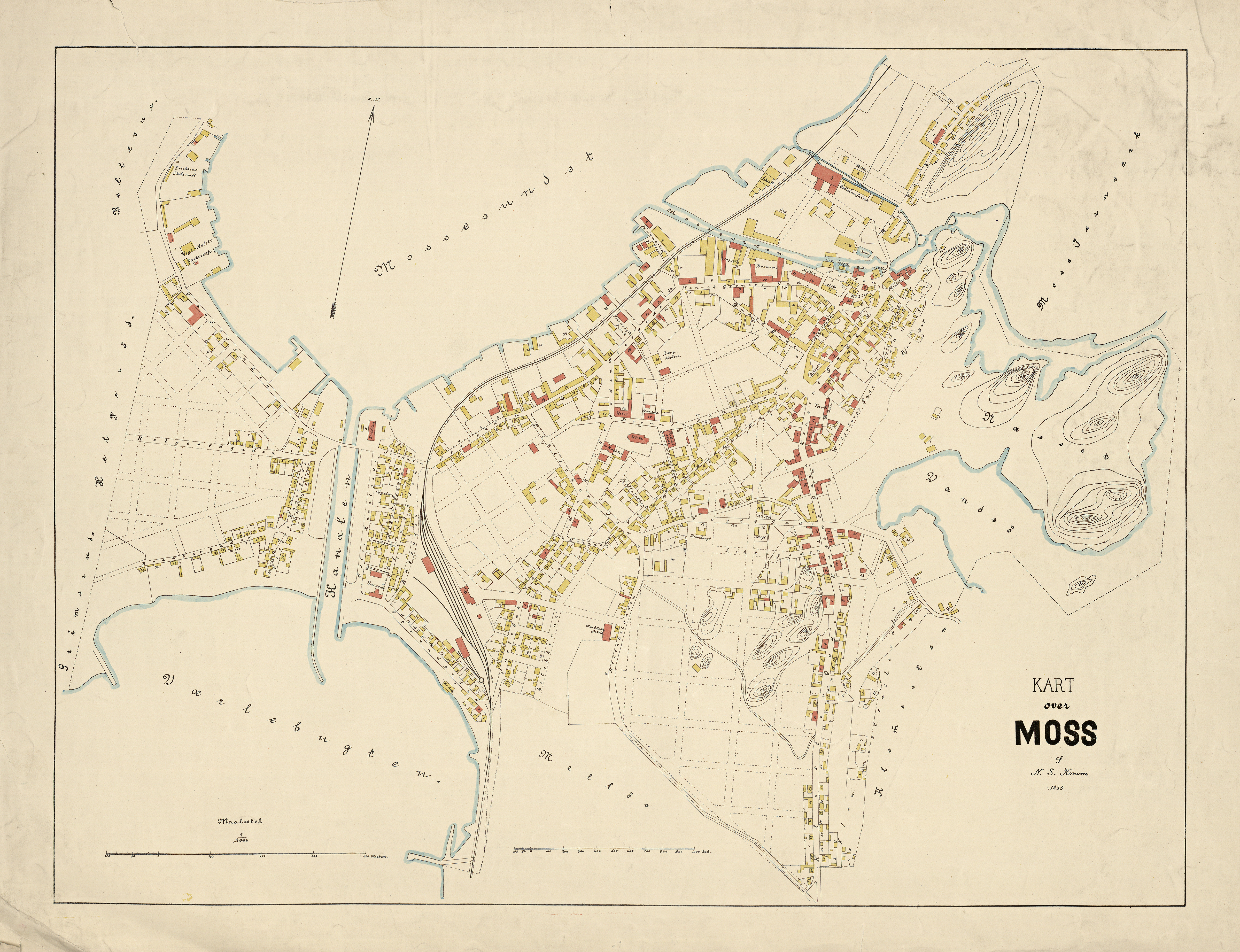 Kart over Moss (1885)